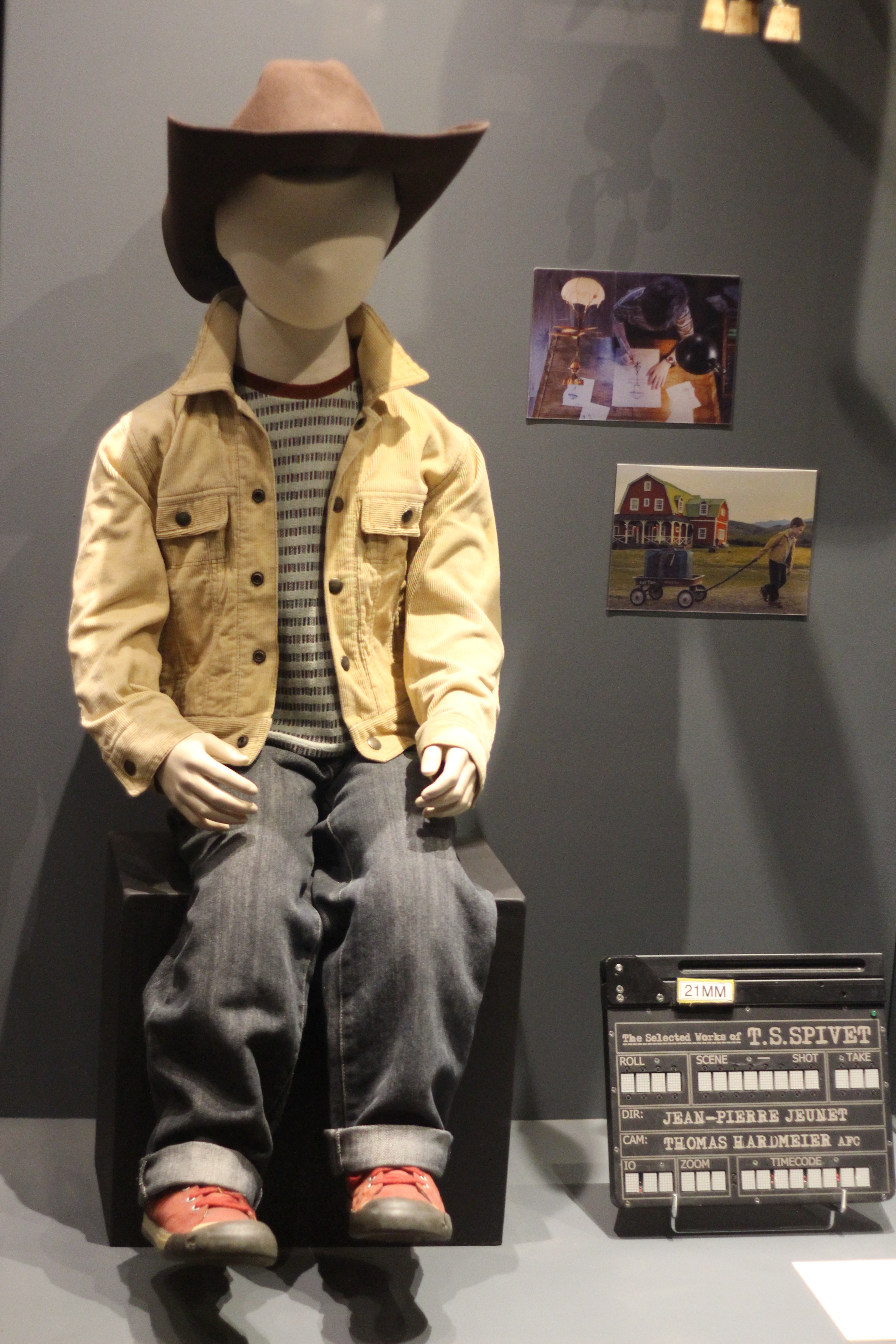 Costume de T.S. Spivet et clap du film L'Extravagant Voyage du jeune et prodigieux T. S. Spivet. Exposition "Caro/Jeunet" au musée Minature et Cinéma en 2018-2019.